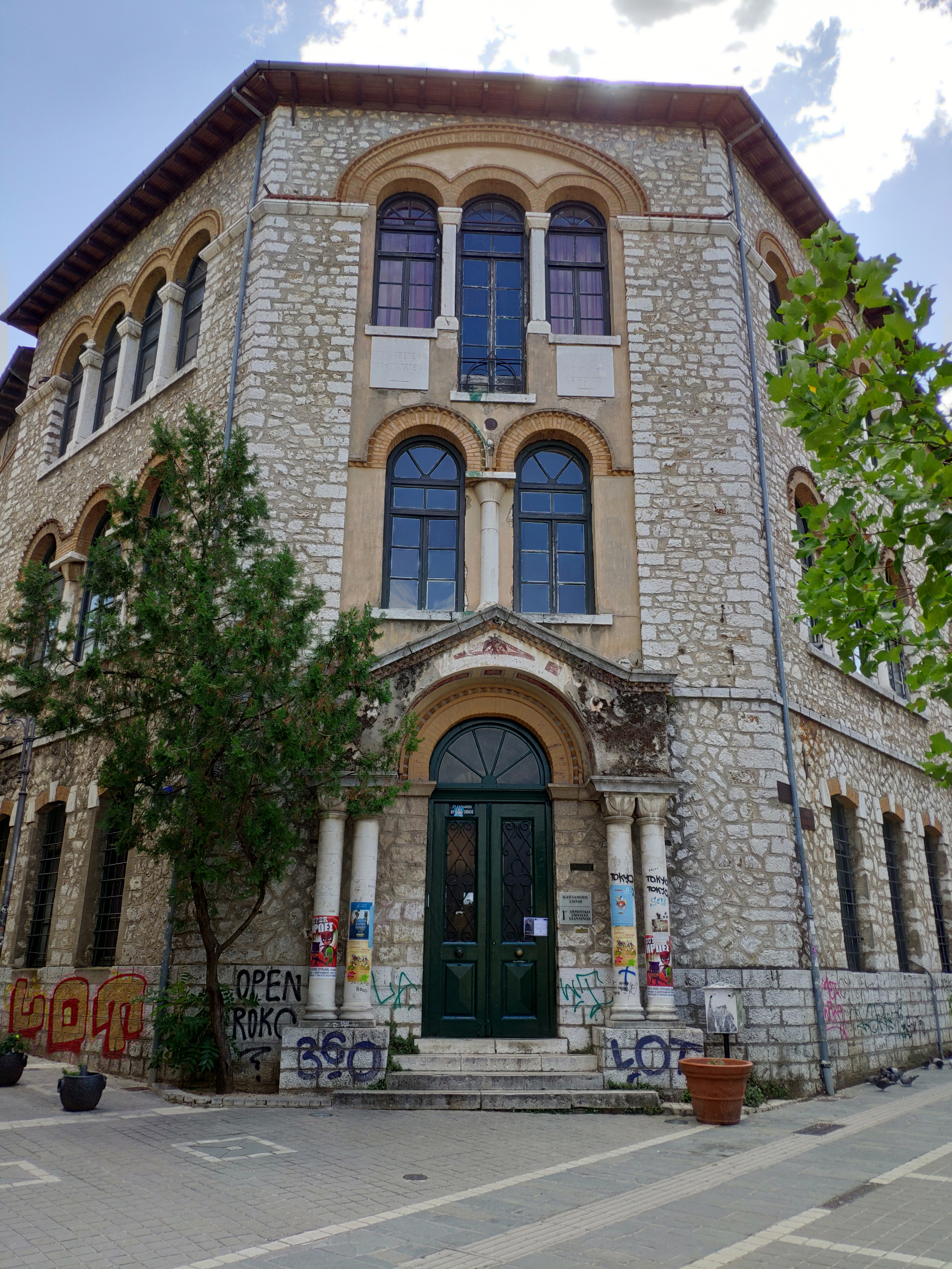 Καπλάνειο Μέγαρο Ιωαννίνων«Καπλάνειο Μέγαρο»